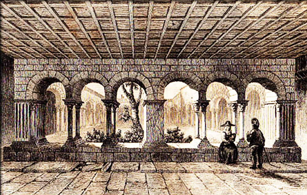 Cloitre de la cathédrale Saint-Maurice de Vienne